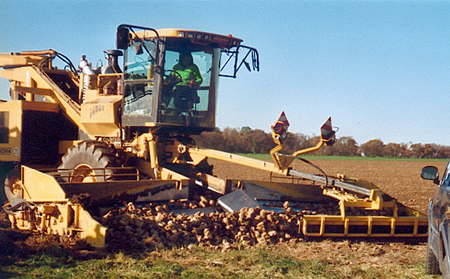 ROPA-Rübenreinigungslader („Rübenlademaus“) bei der Aufnahme der restlichen Rüben